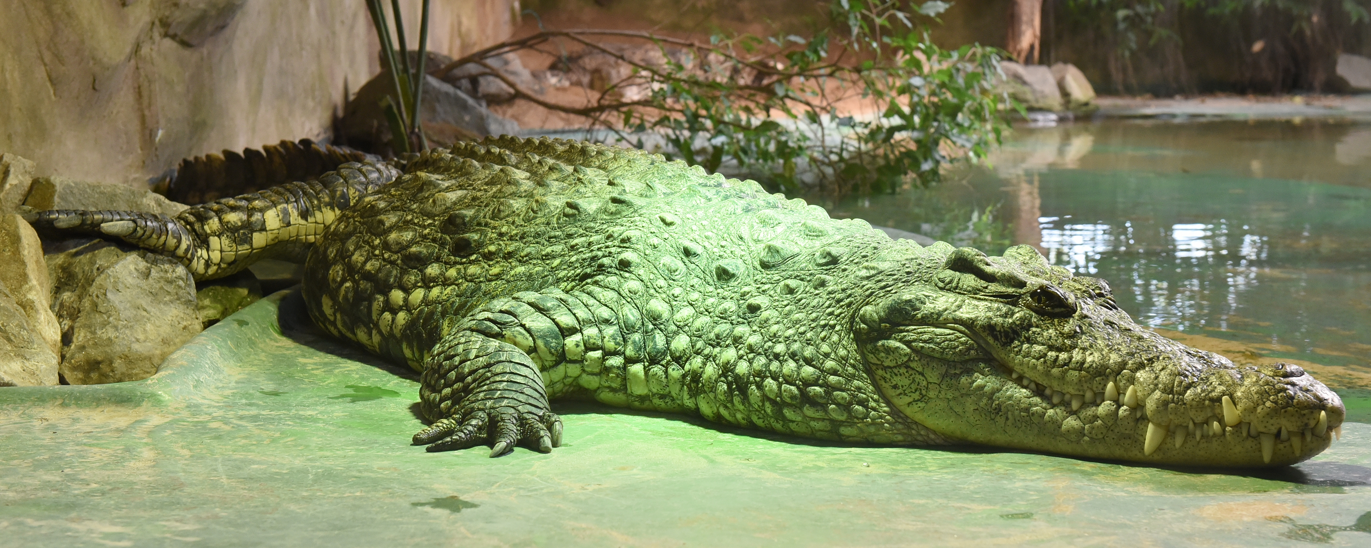 Nilkrokodil im TerraZoo Rheinberg.